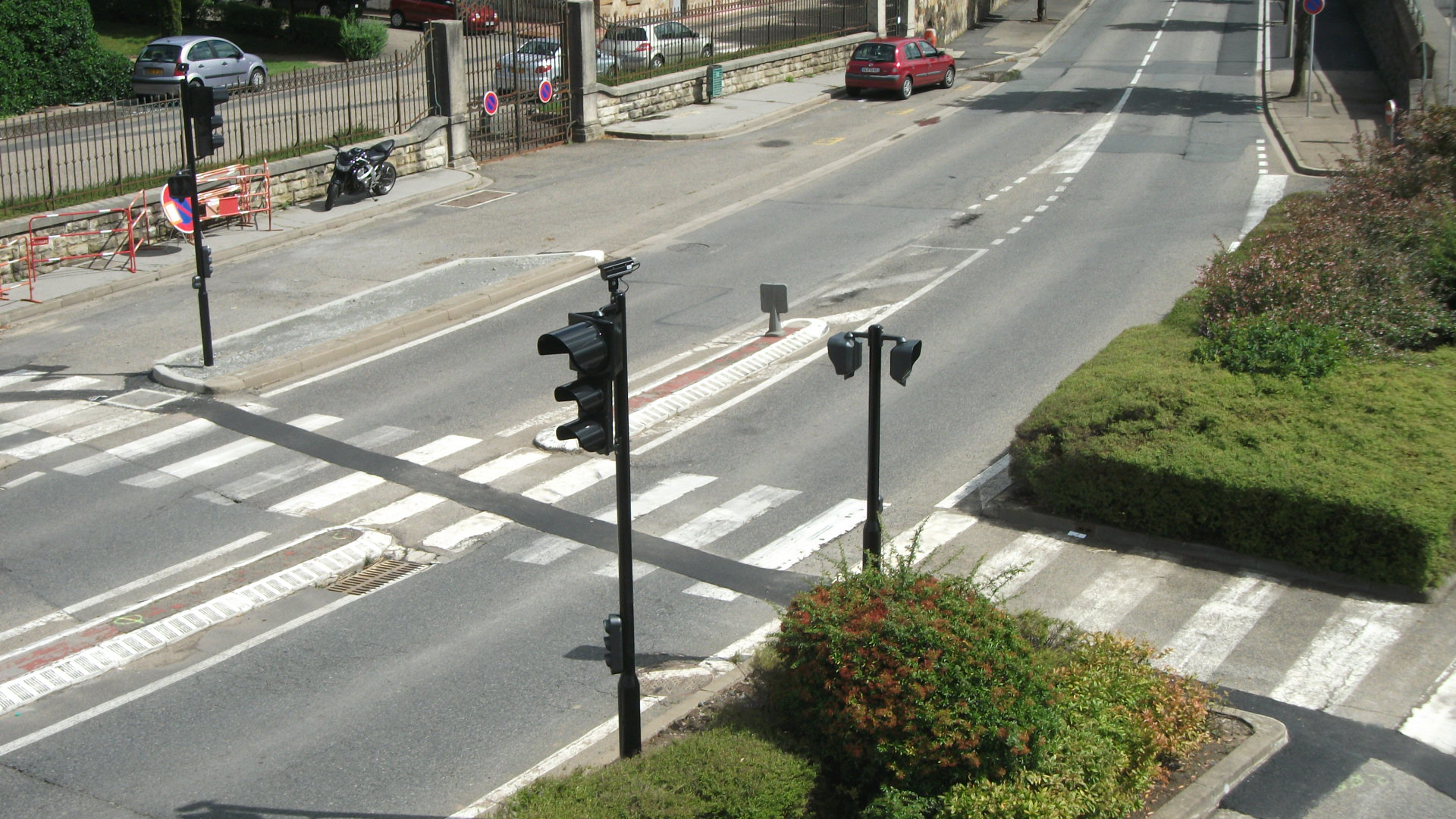 Les feux de circulation routière du boulevard de l'Hôpital à Vichy ont été implantés en juillet 2011 (aménagement de sécurité). Ce boulevard est réputé dangereux.Feux de circulation : statut à la prise de vue hors service et n’a jamais fonctionné. Fabricant : trafic Lacroix